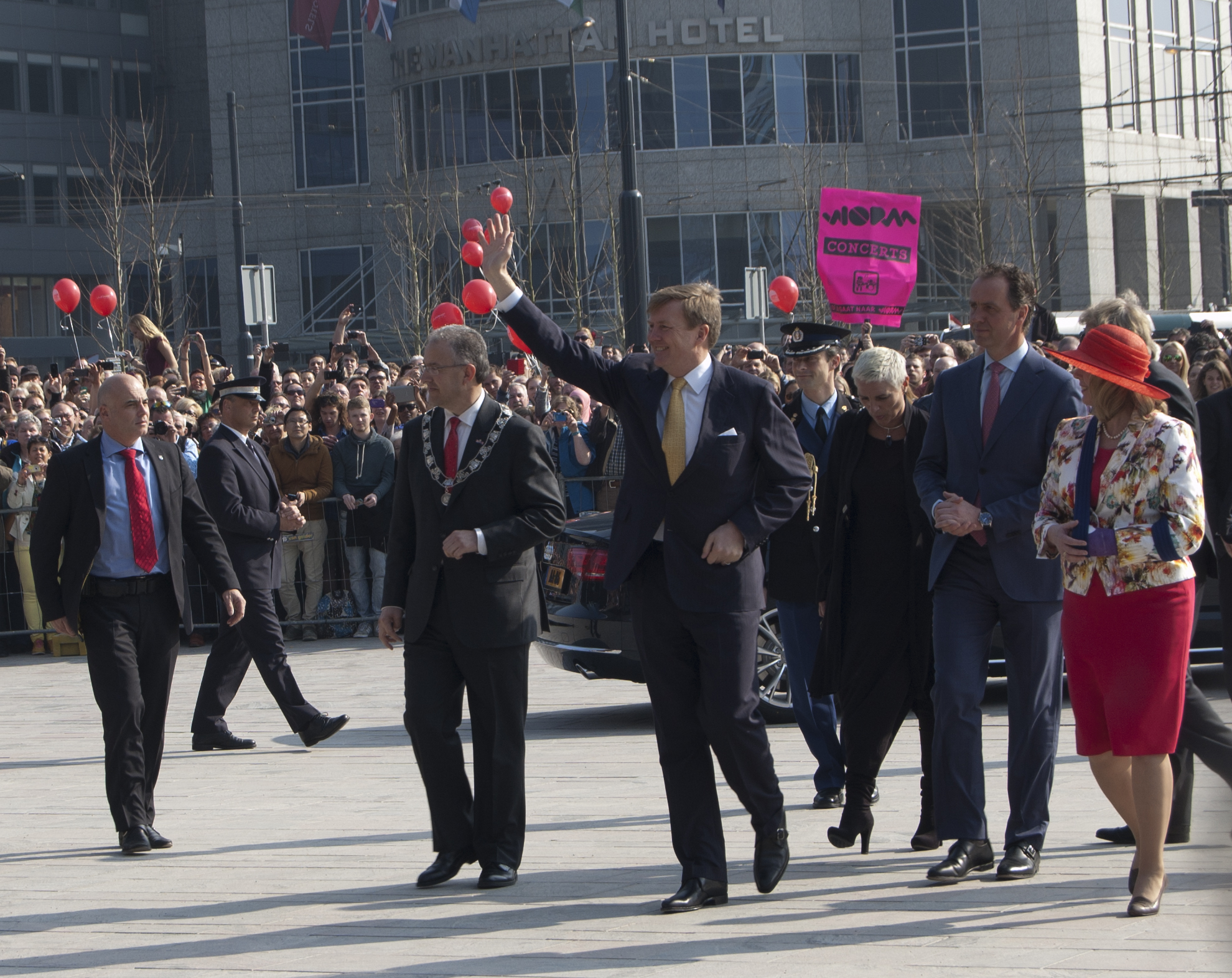 De ontvangst van koning Willem-Alexander. Foto genomen tijdens de officiële opening van het hernieuwde Rotterdam CS.